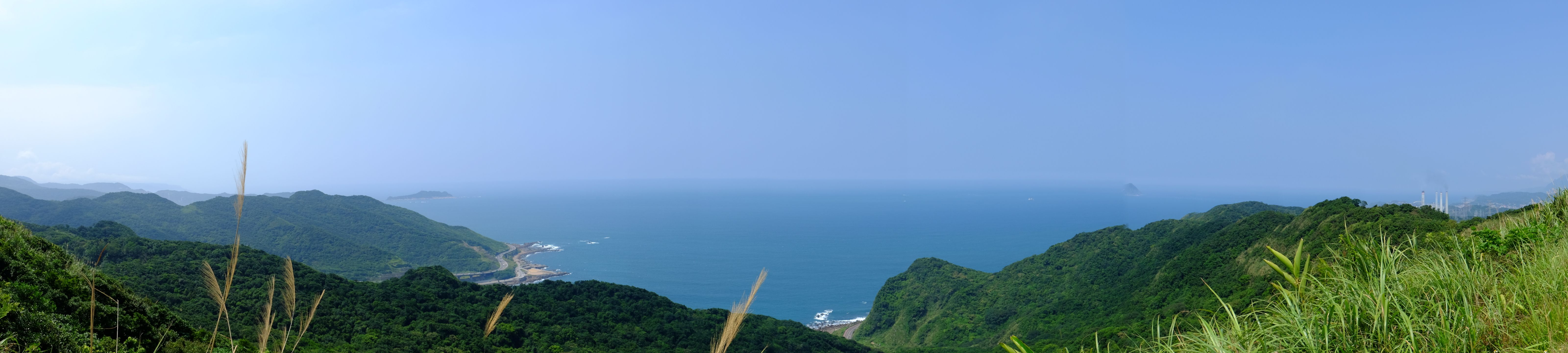 大武崙砲臺展望